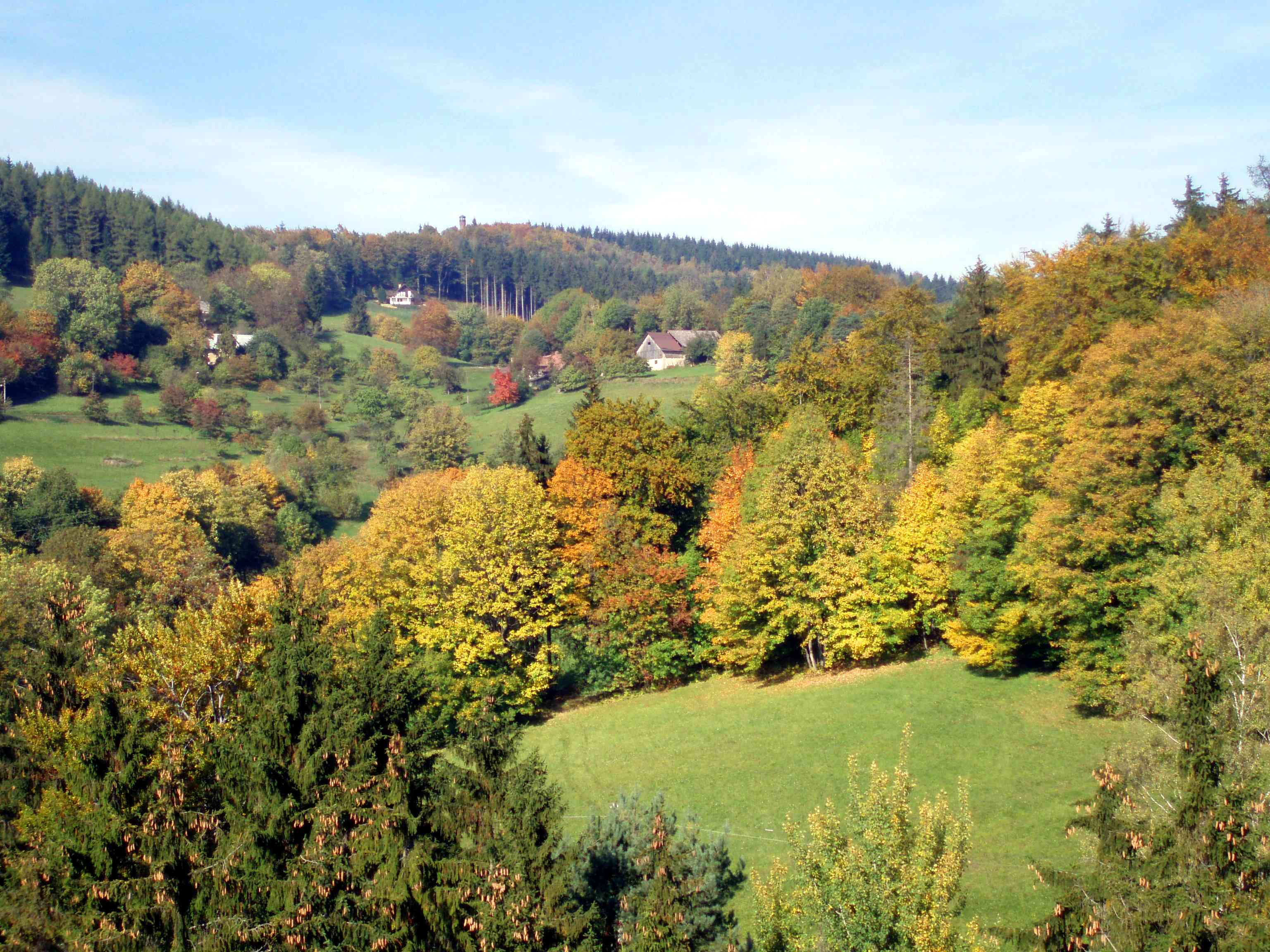 Blick von der Burgruine Friedstein zur Kopanina